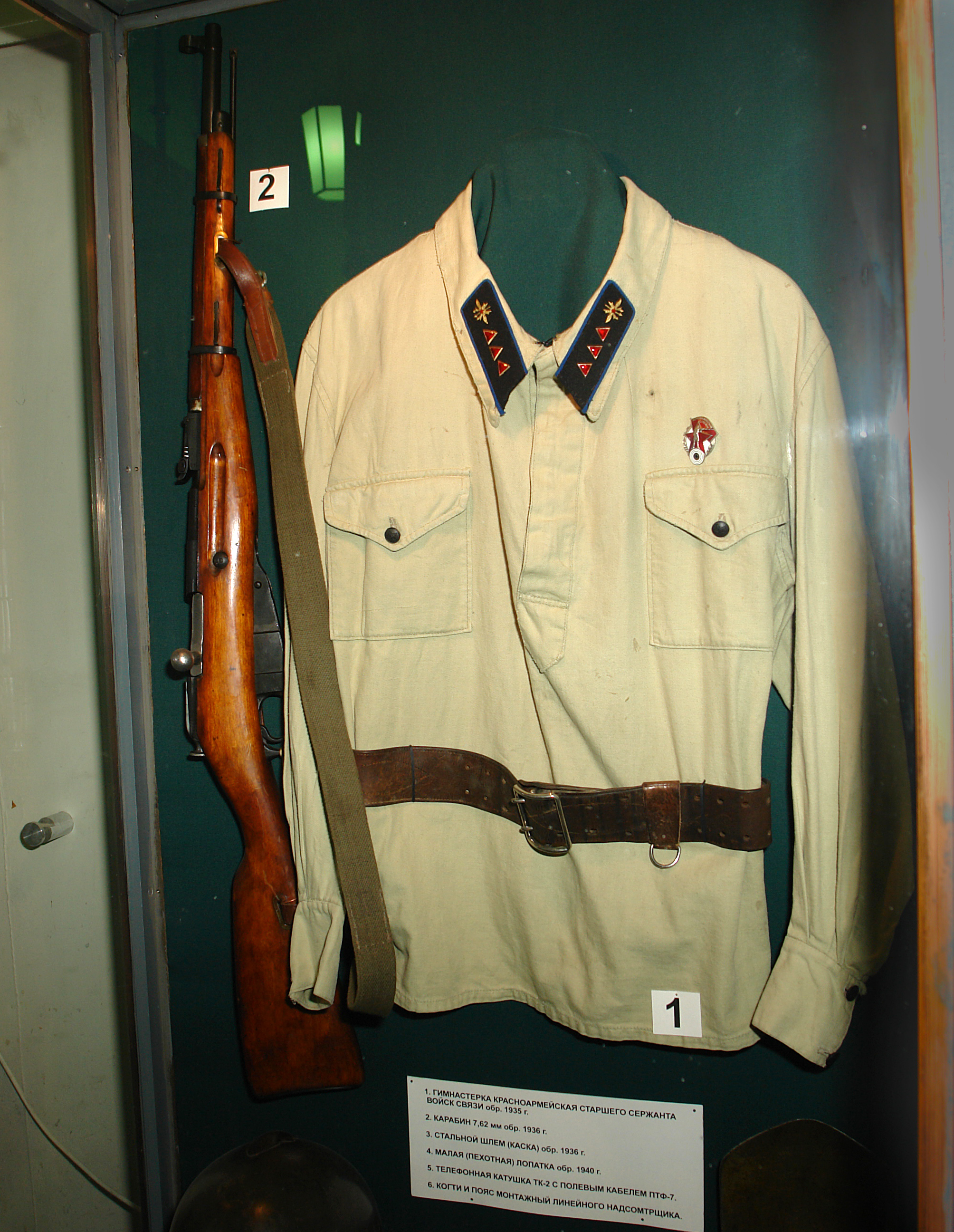 1. Gymnastjorka eines Obersergeanten der Fernmeldetruppe der Roten Arbeiter- und Bauernarmee, Ausführung 1935. 2. Karabiner 7,62 mm, Ausführung 1936. Militär-historisches Museum der Artillerie, Pioniertruppen und der Fernmeldetruppe zu Sankt Petersburg.